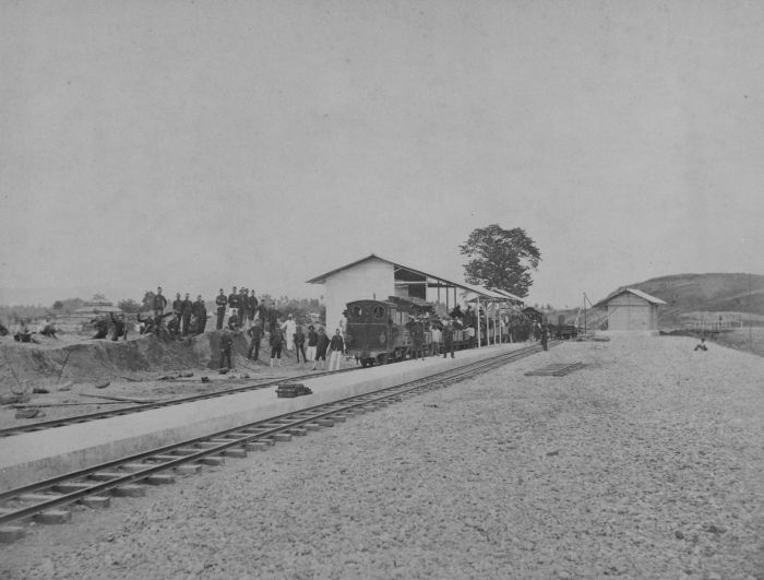 foto. Militairen bij een trein langs het perron van het spoorwegstation in Indrapoeri op Atjeh, met op de achtergrond de moskee